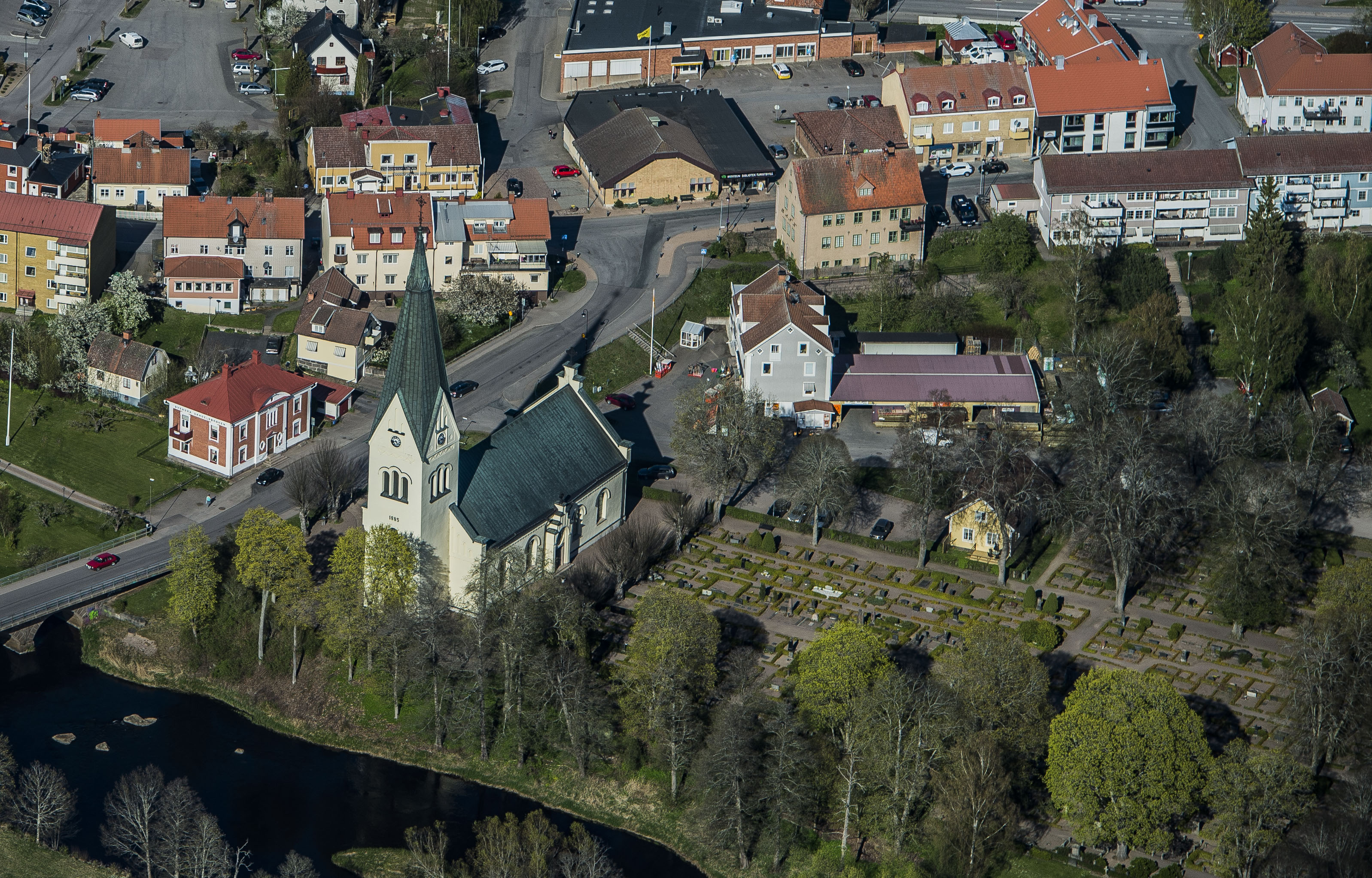 Högsby ka